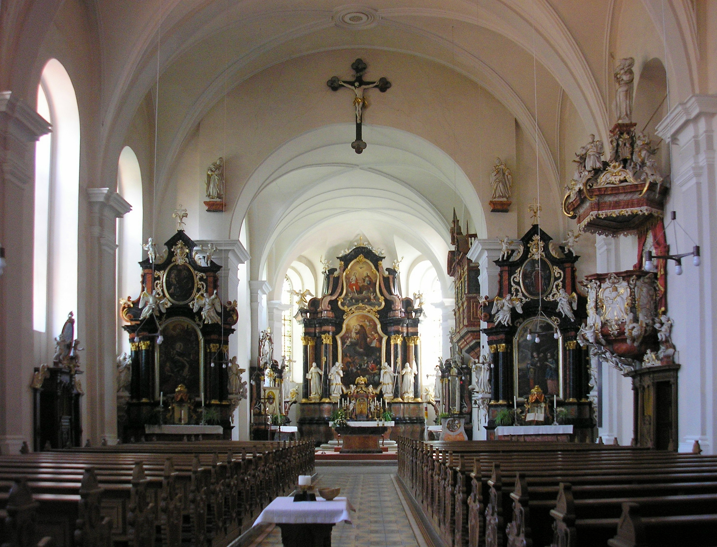 Worbis, St. Antonius, Inneres